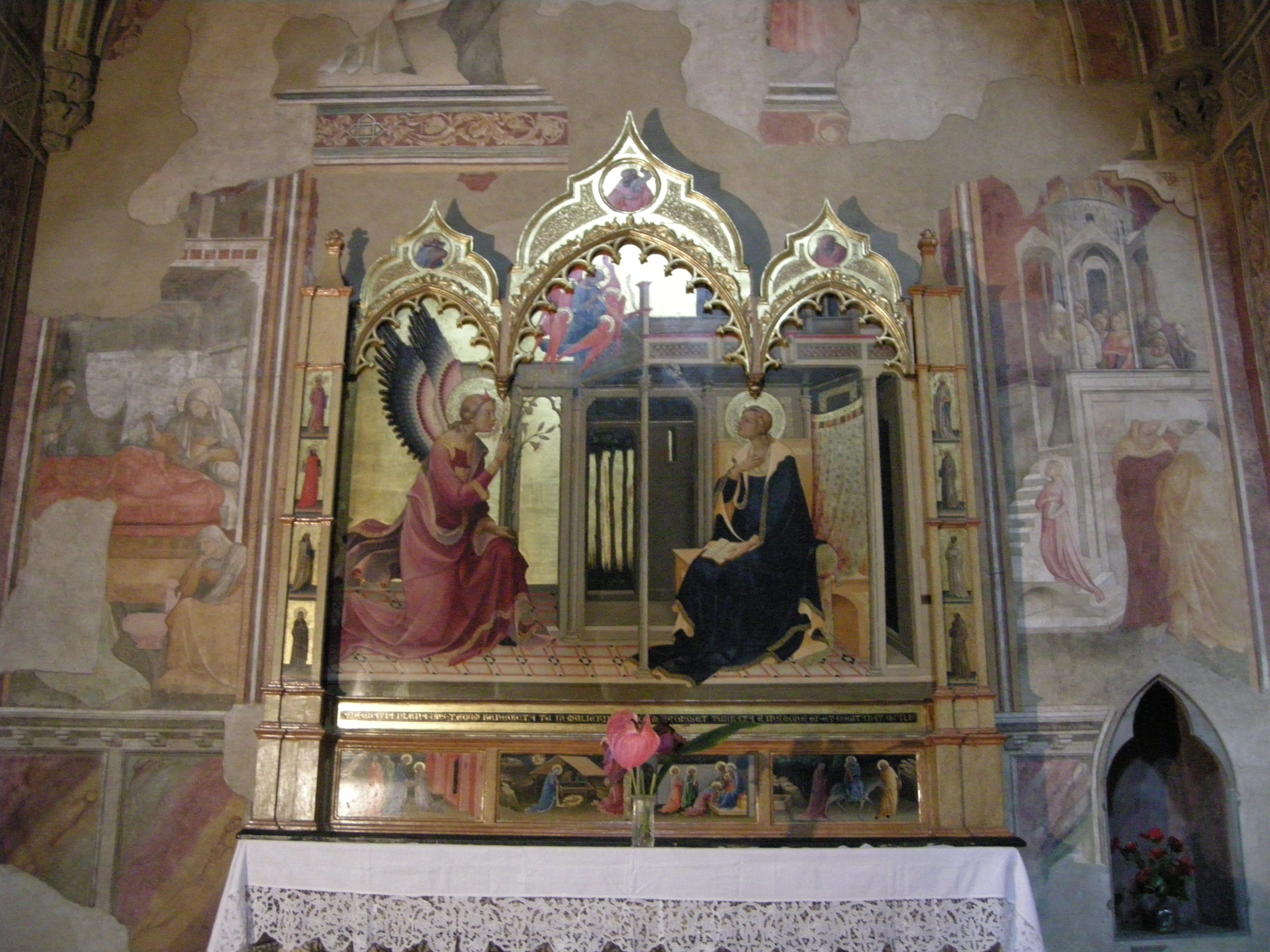 Cappella bartolini salimbeni, annunciazione di lorenzo monaco